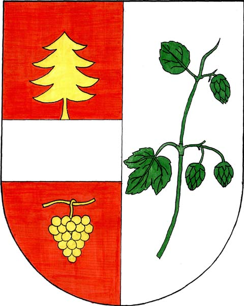 Znak obce Vinařice